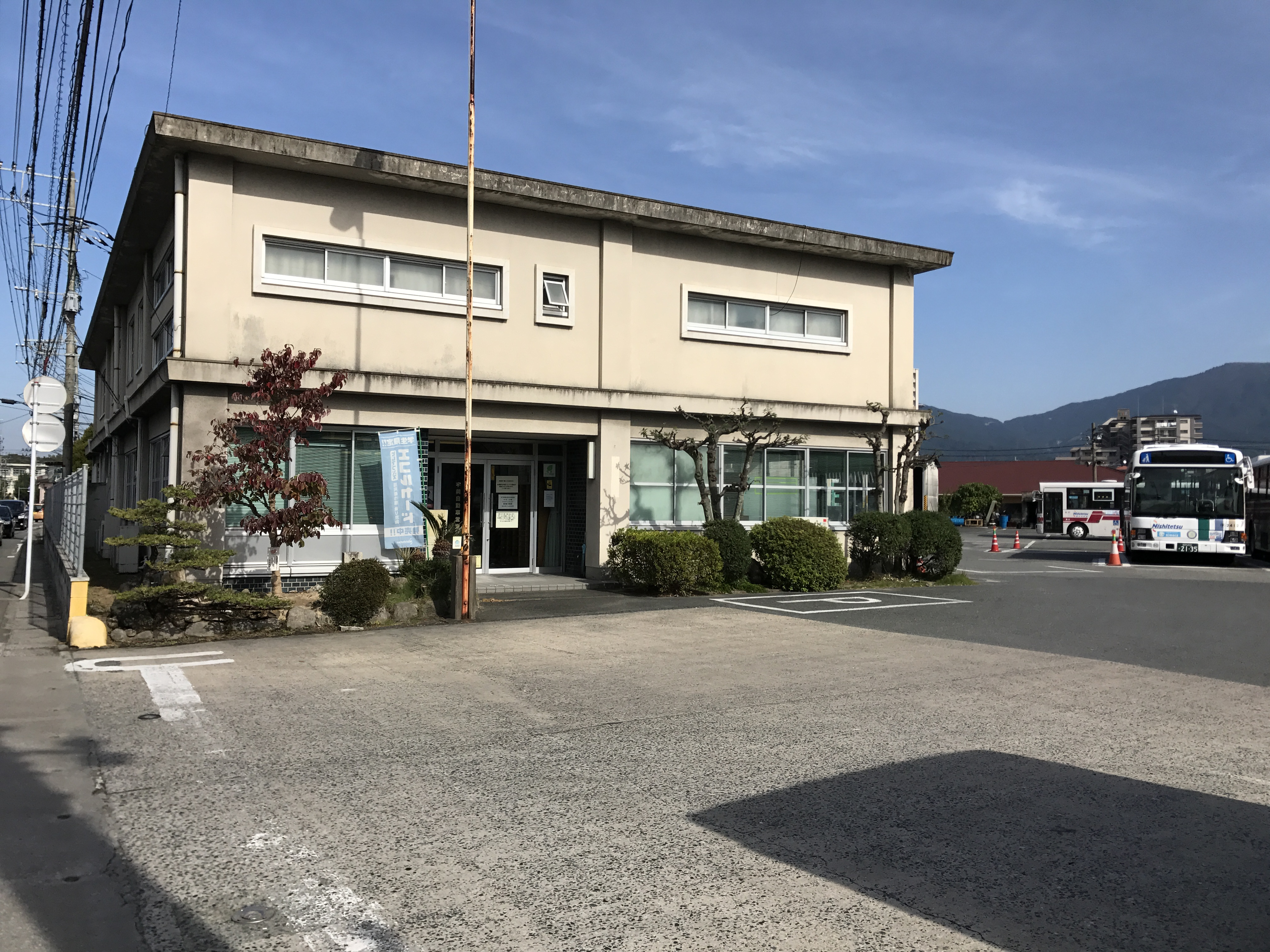 西日本鉄道宇美自動車営業所